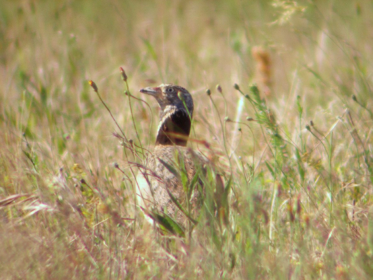 Tetrax tetrax male